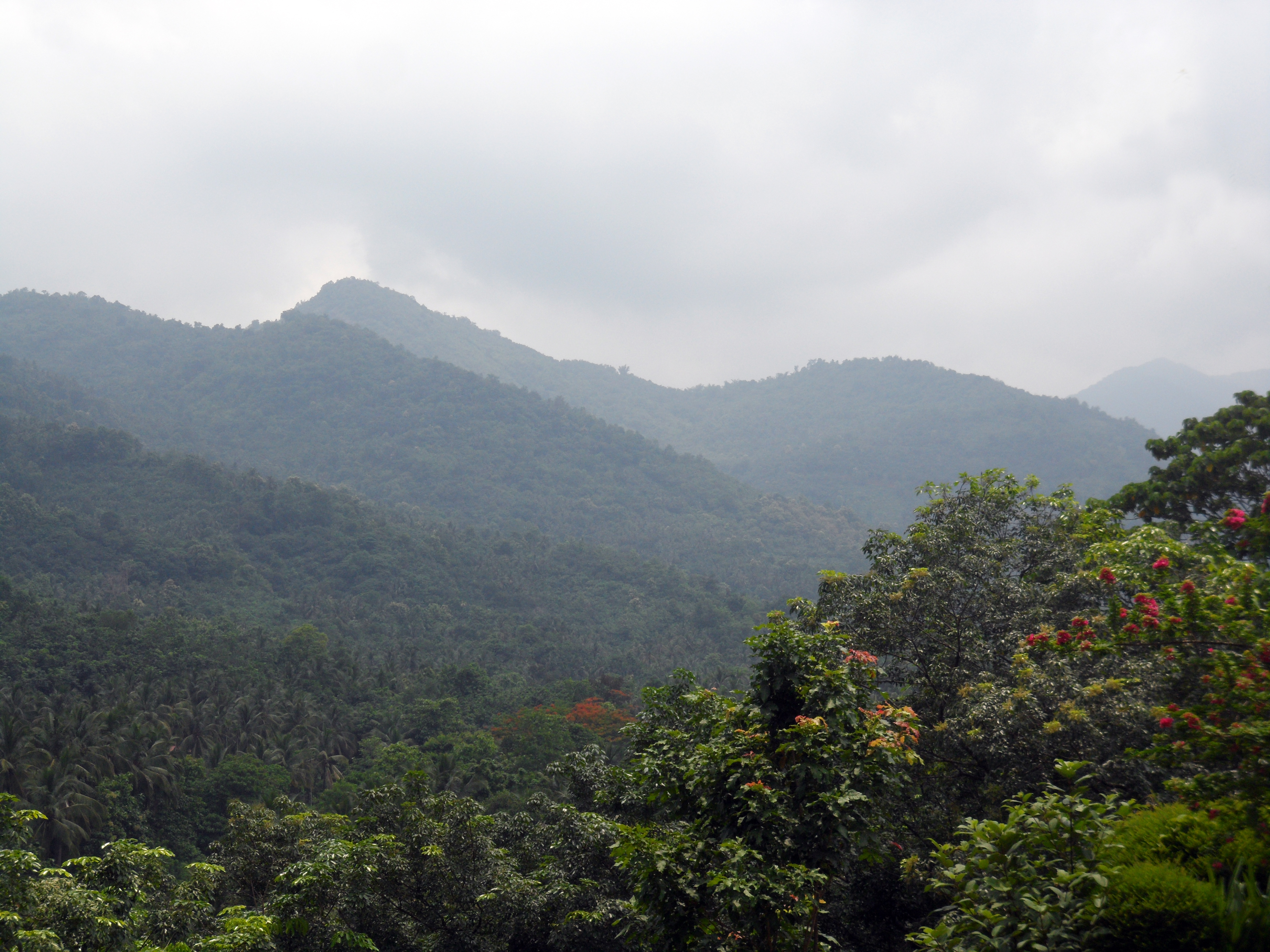 ചന്ദനക്കാംപാറയിലെ മലനിരകളുടെ ഒരു ദൃശ്യം